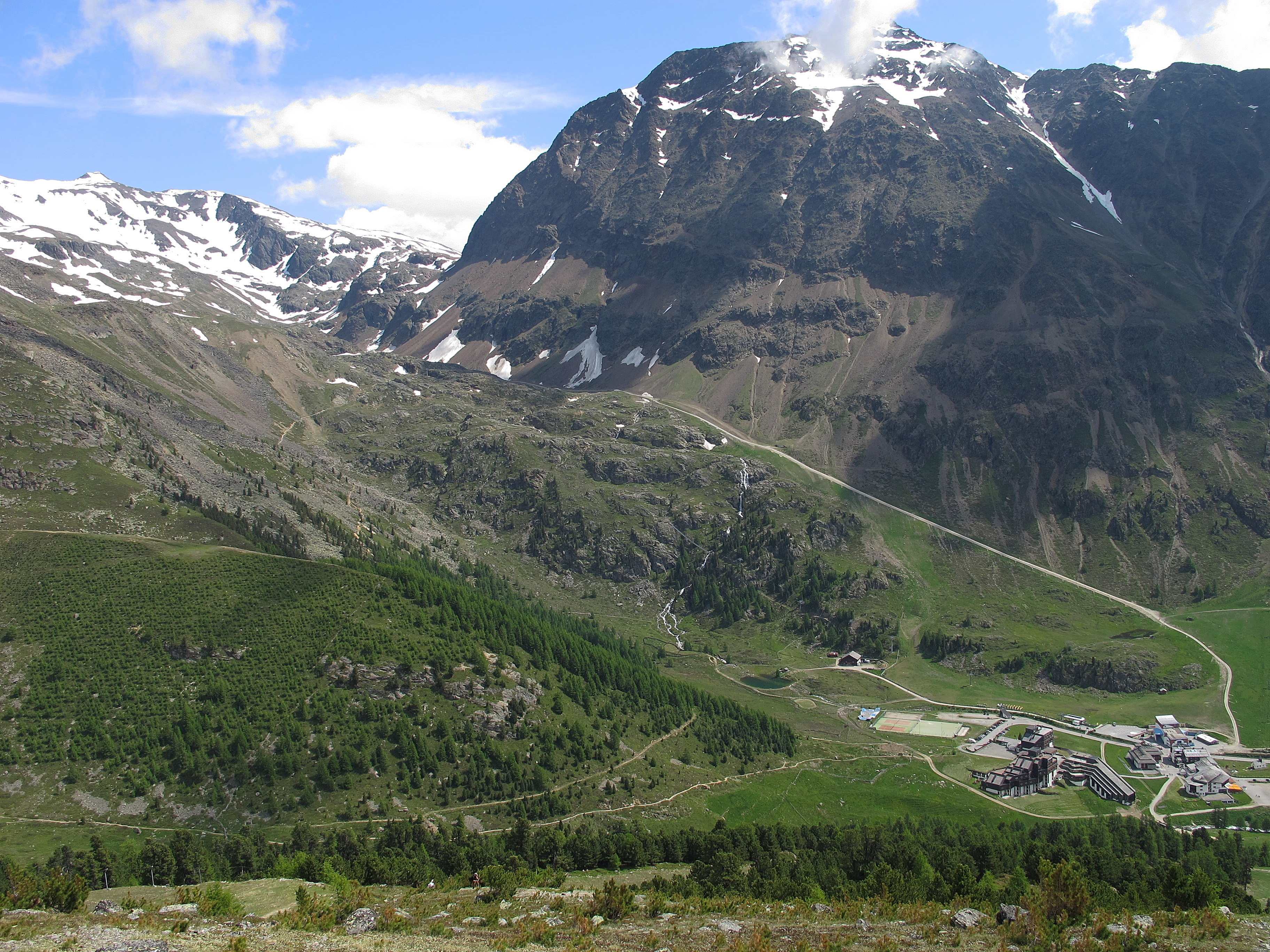 Kurzras im Schnalstal (Südtirol)